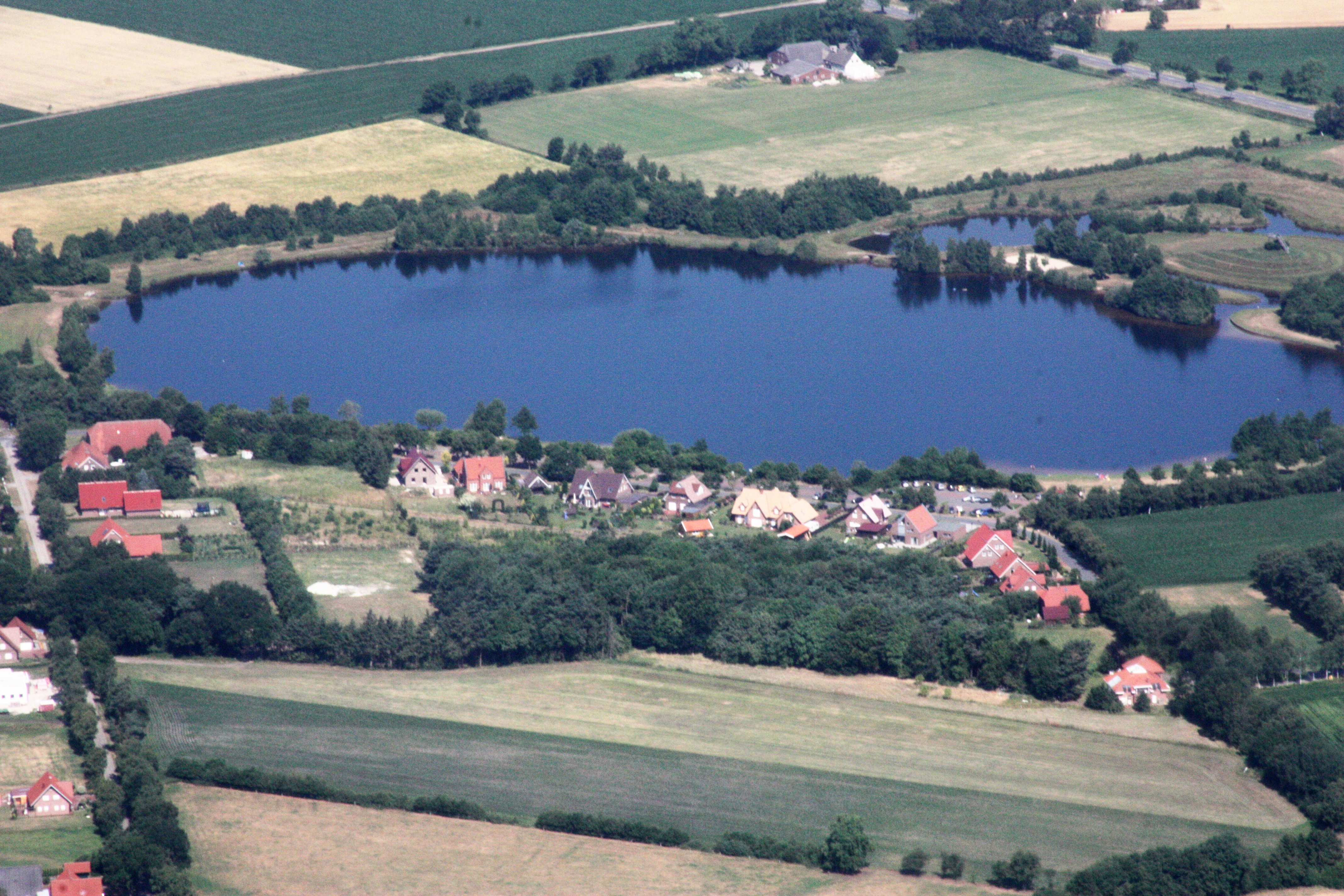 Luftaufnahme; Flug von Westerstede nach Leer; Flughöhe 1500 ft; Juli 2010; Originalfoto bearbeitet: Tonwertkorrektur und Bild geschärft mit Hochpassfilter